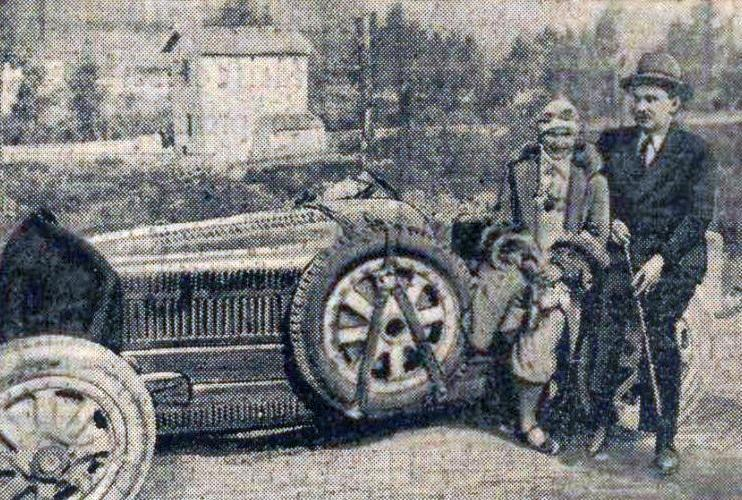 Elisabeth Junek à la Targa Florio 1928, au côté du chevalier Florio.